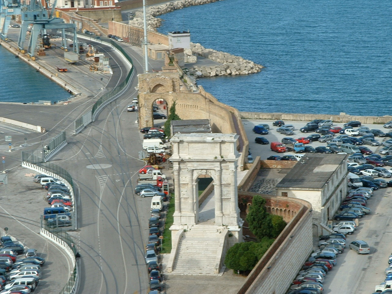 Ancona arch of Traiano and Clementino. Foto personale. Licenza